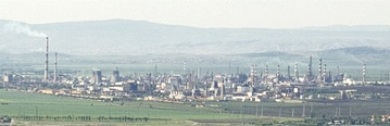 Заводът на Лукойл Нефтохим при Бургас